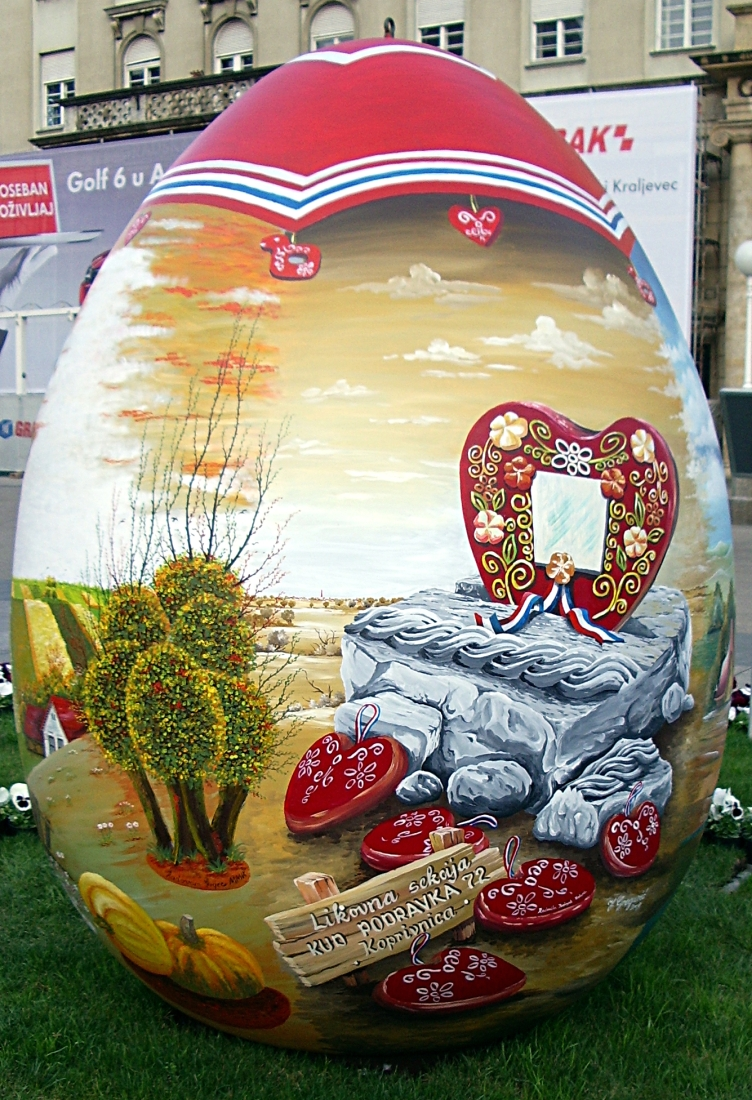 Zagrebačko uskršnje jaje na Trgu bana Jelačića